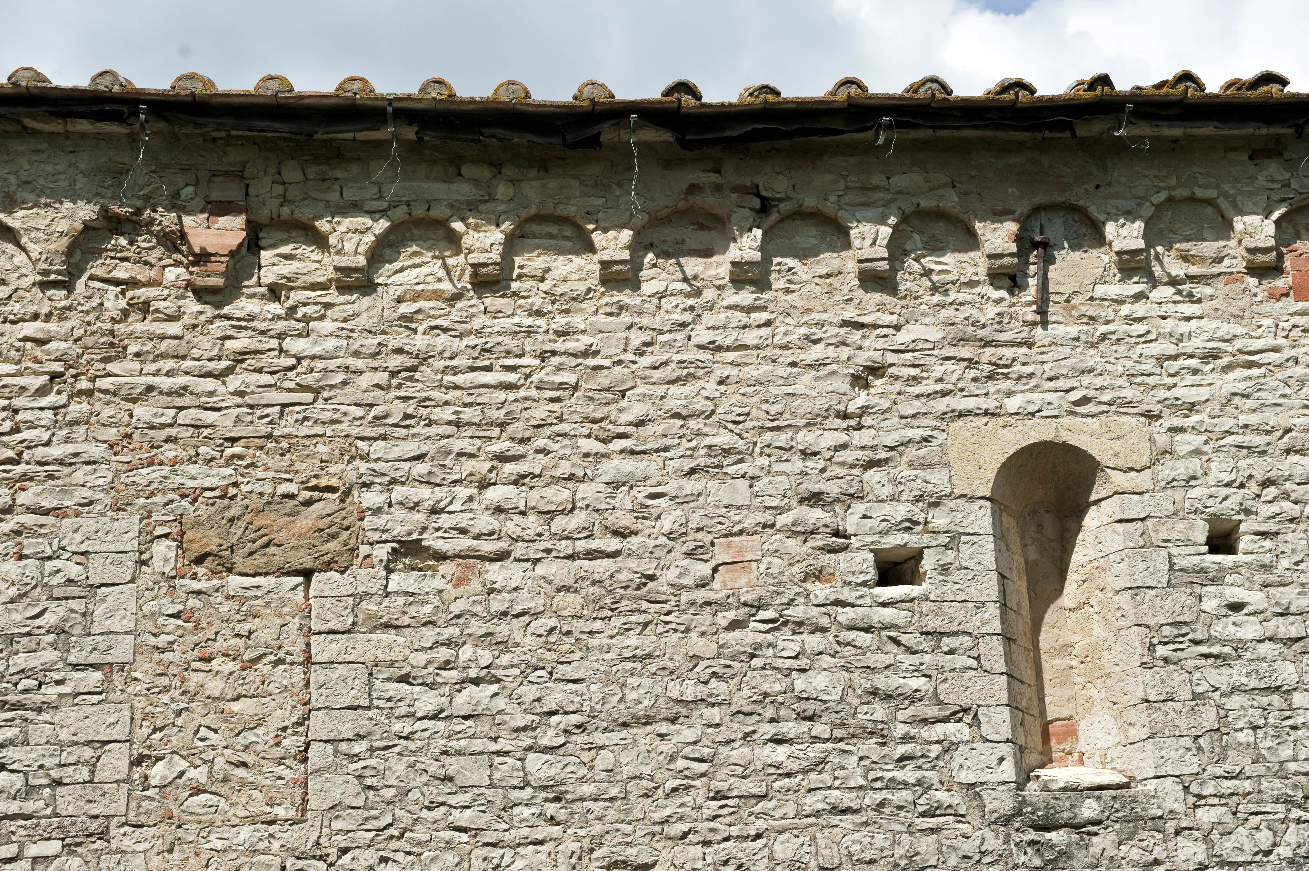 Particolare degli archetti pensili posti nel sottogronda dell'Oratorio del Beato Gherardo (Bagno a Ripoli)